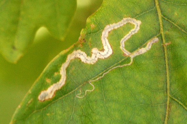 Stigmella roborella from Commanster, Belgian High Ardennes .